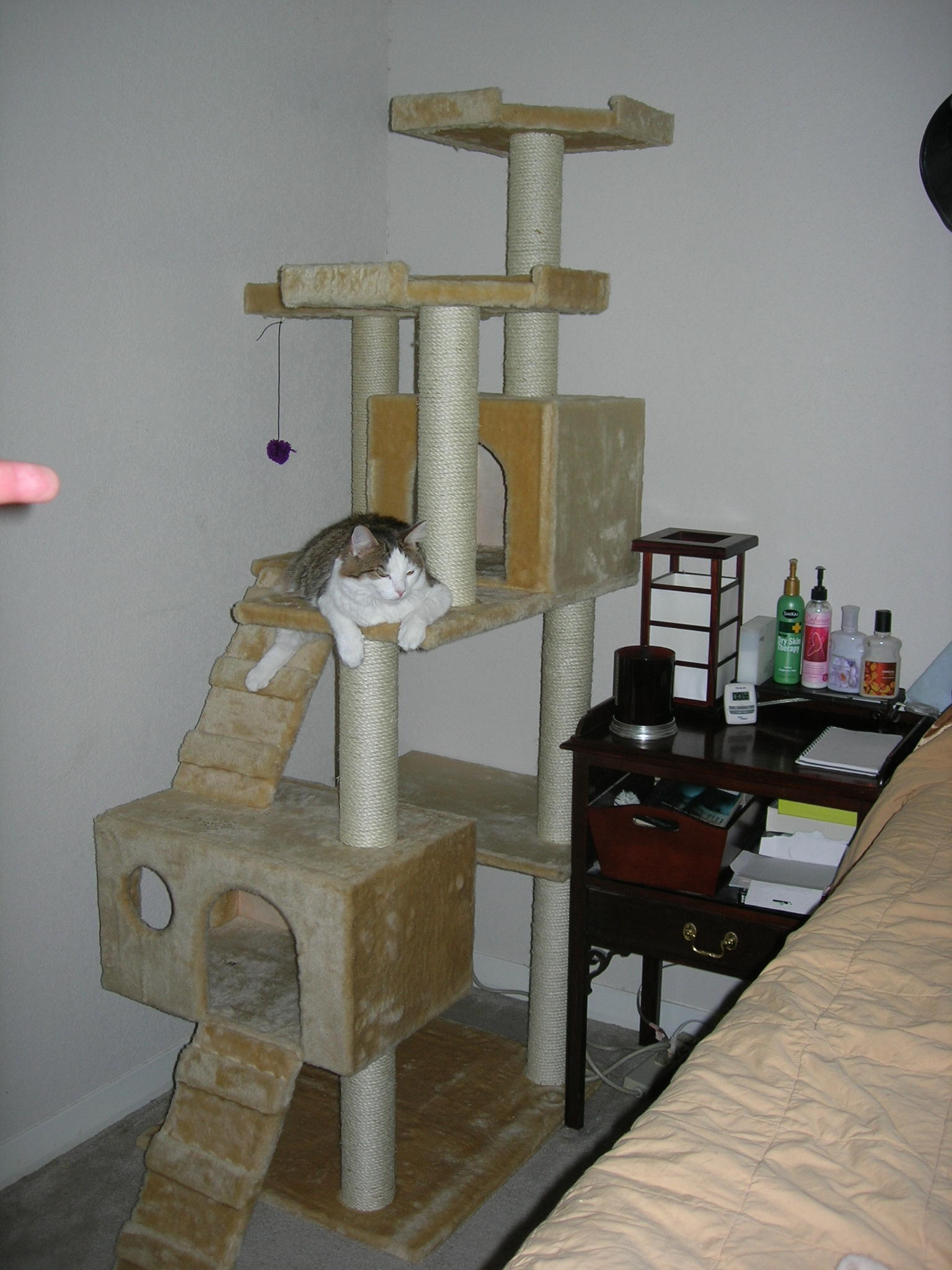 Multi tier cat tree / cat condo